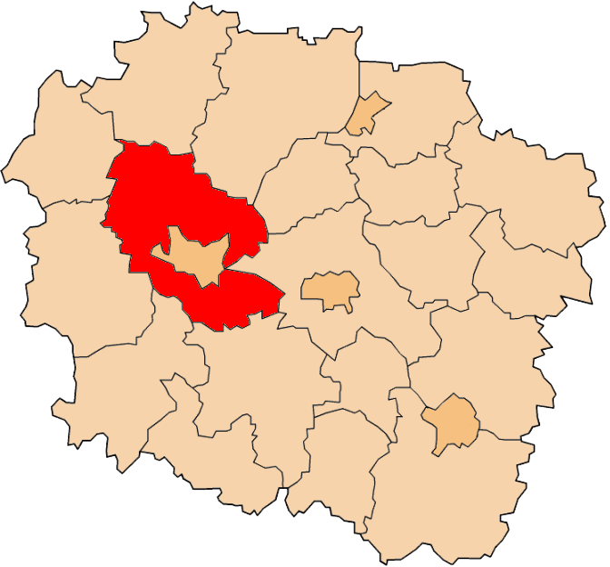 Powiat bydgoski na mapie województwa kujawsko-pomorskiego.